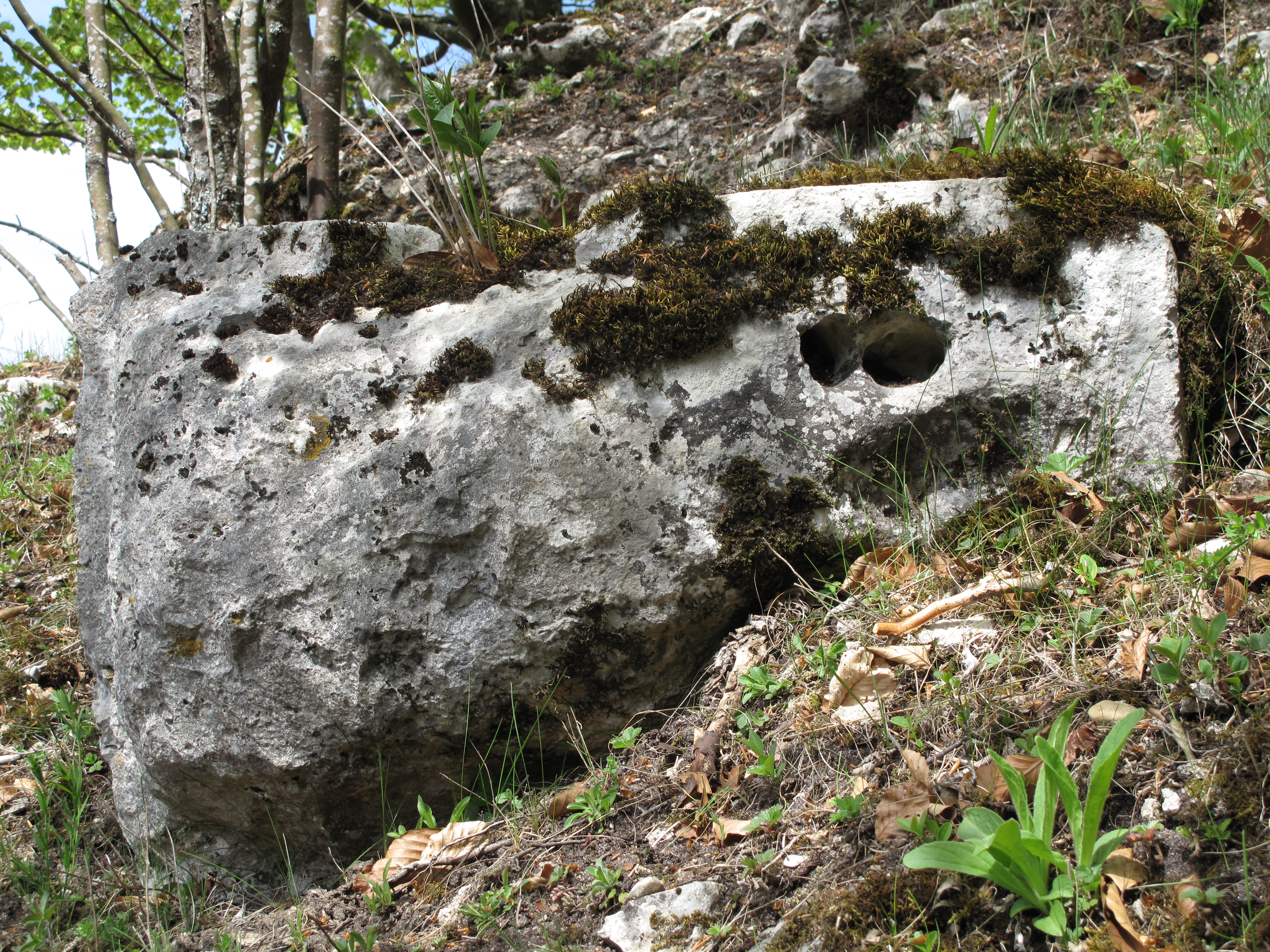 Großer Buckelquader, 94 x 60 cm (L x H) mit 4-5 cm Randschlag.